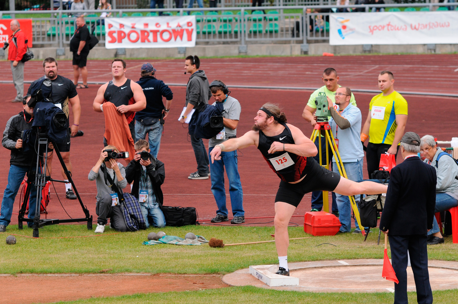 Tomasz Majewski podczas startu w 2. Memoriale Kamili Skolimowskiej, 20 września 2011 roku w Warszawie.